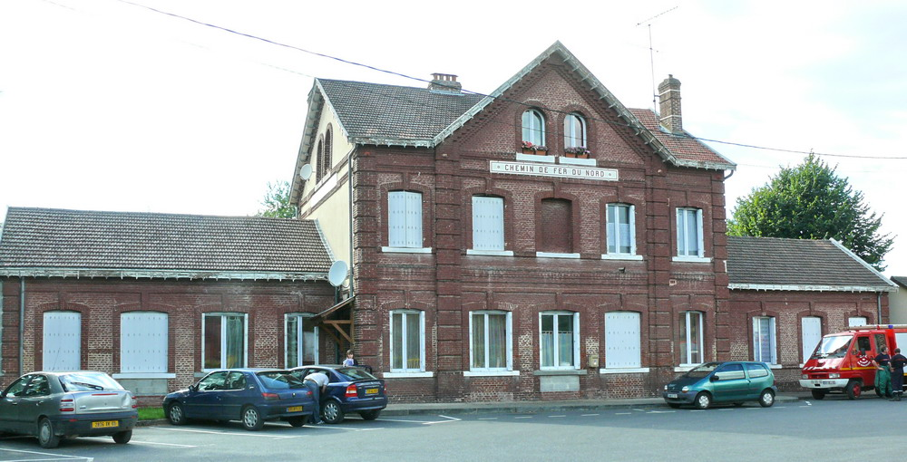 Facade sur rue de la Gare de Saint-Omer-en-Chaussée (Oise). La station étant désormains un Point d'arret non géré (PANG), le bâtiment voyageur n'a plus d'usage ferroviaire, et a été transformé en logements.